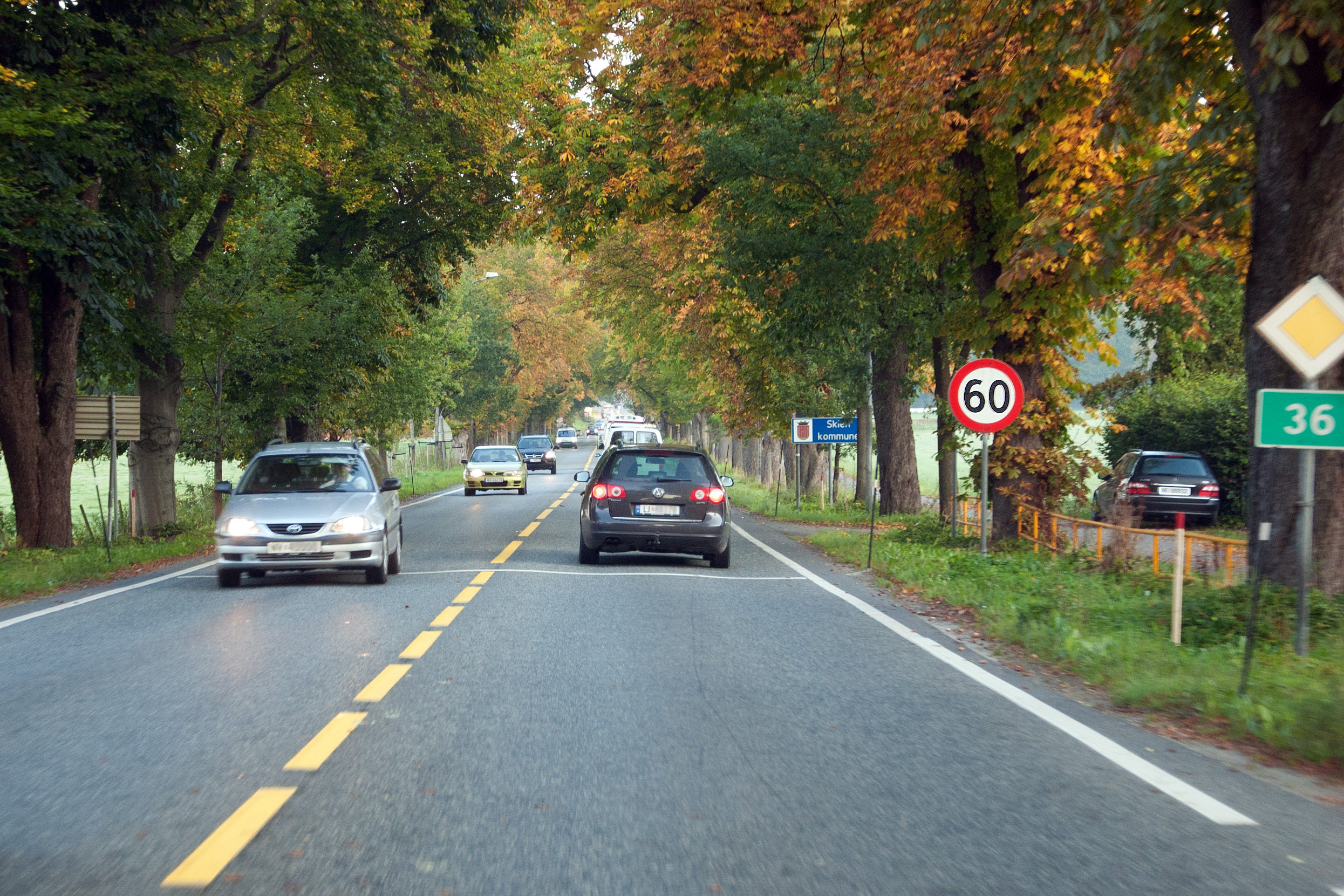 Tidligere Riksvei 36, Gunnar Knudsens veg på grensa mellom Porsgrunn og Skien kommuner i Telemark.